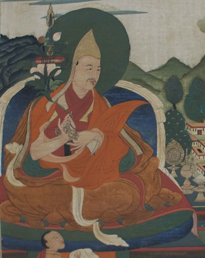 Ngawang Konchok Nyima, The Sixth Tatsak Jedrung, b.1653 - d.1707